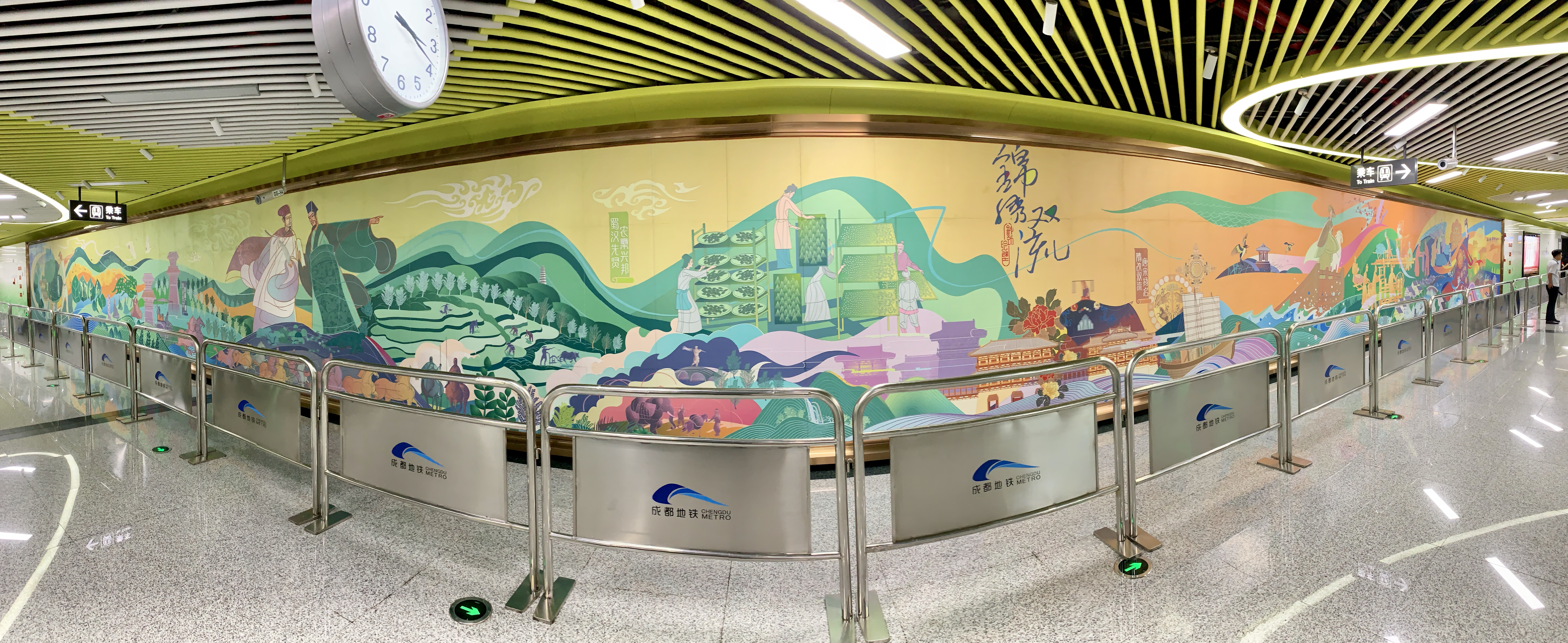 成都地铁双流广场站